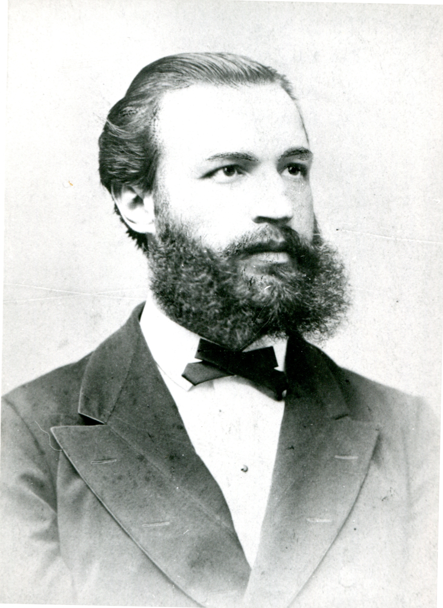 Machik Béla orvosdoktor, egyetemi tanár